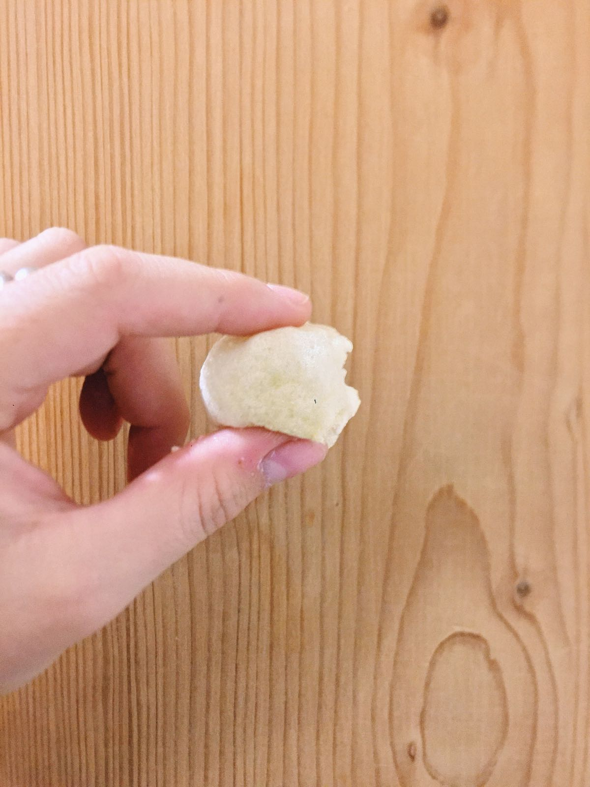 Elaboració a partir d'aigua, gelatina y oli d'oliva